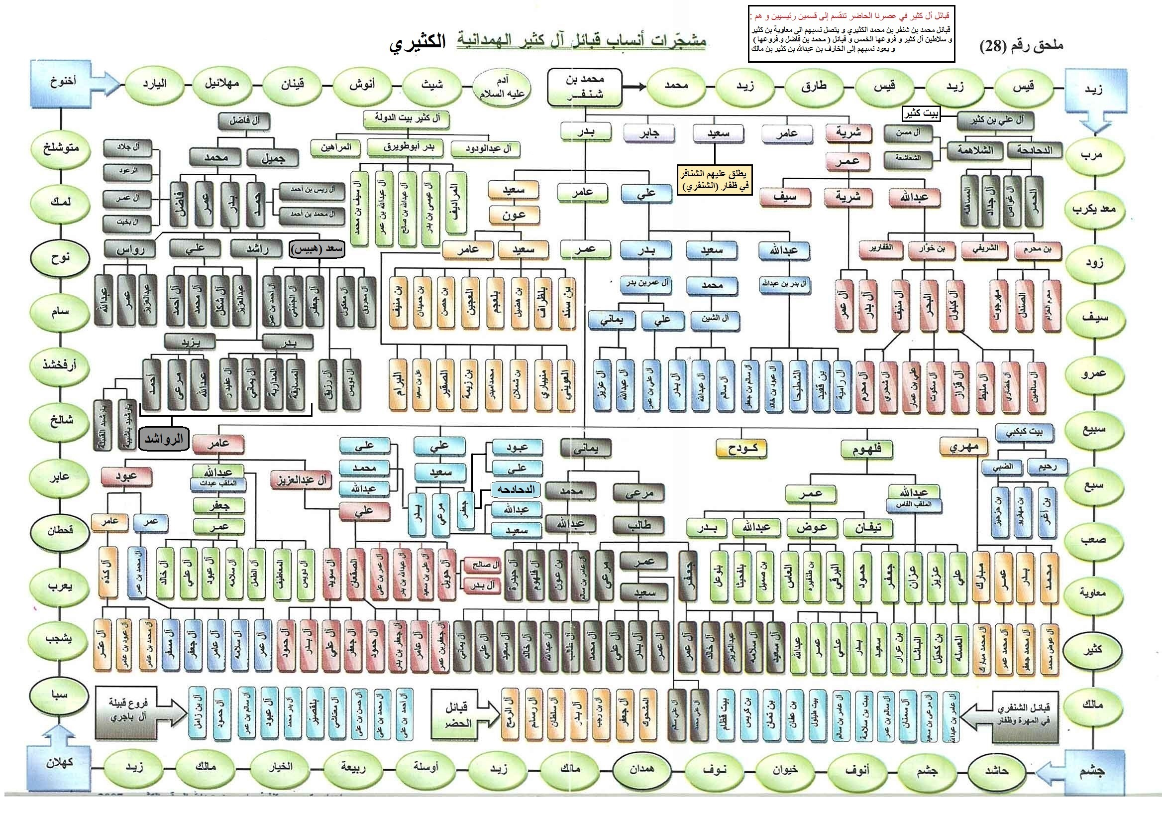 شجرة القبائل الكثيرية و قبيلة أل كثير الهمدانية